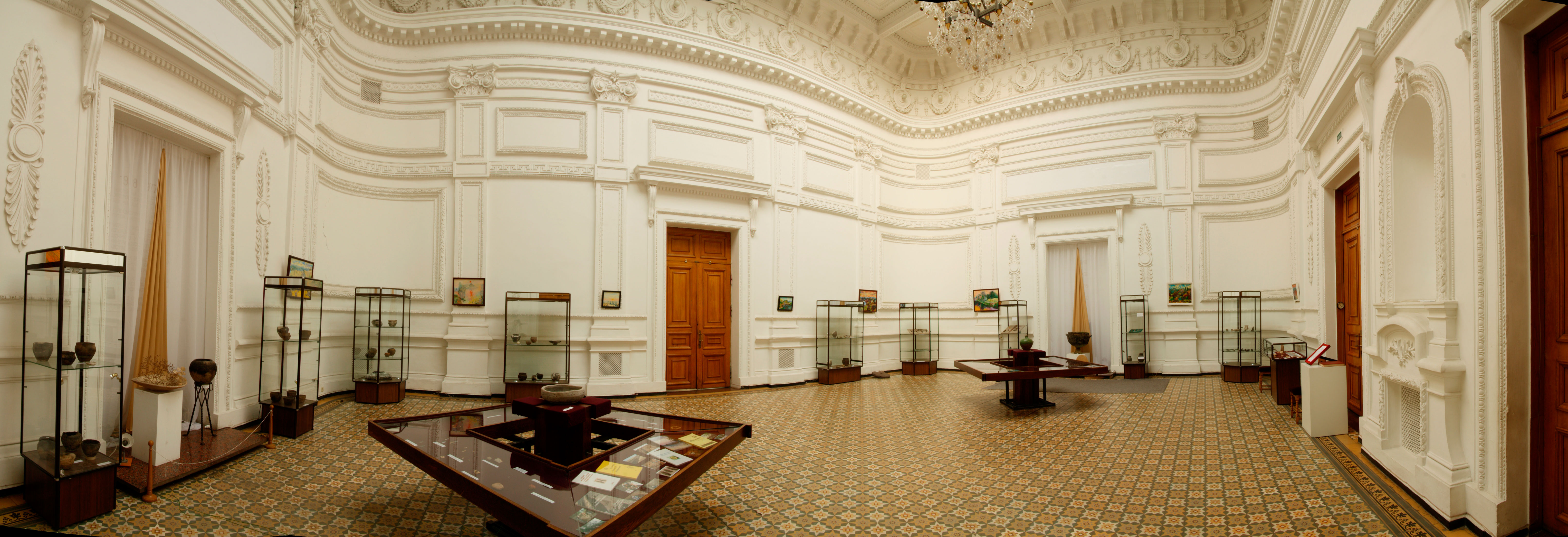 Біла зала (зала №10)